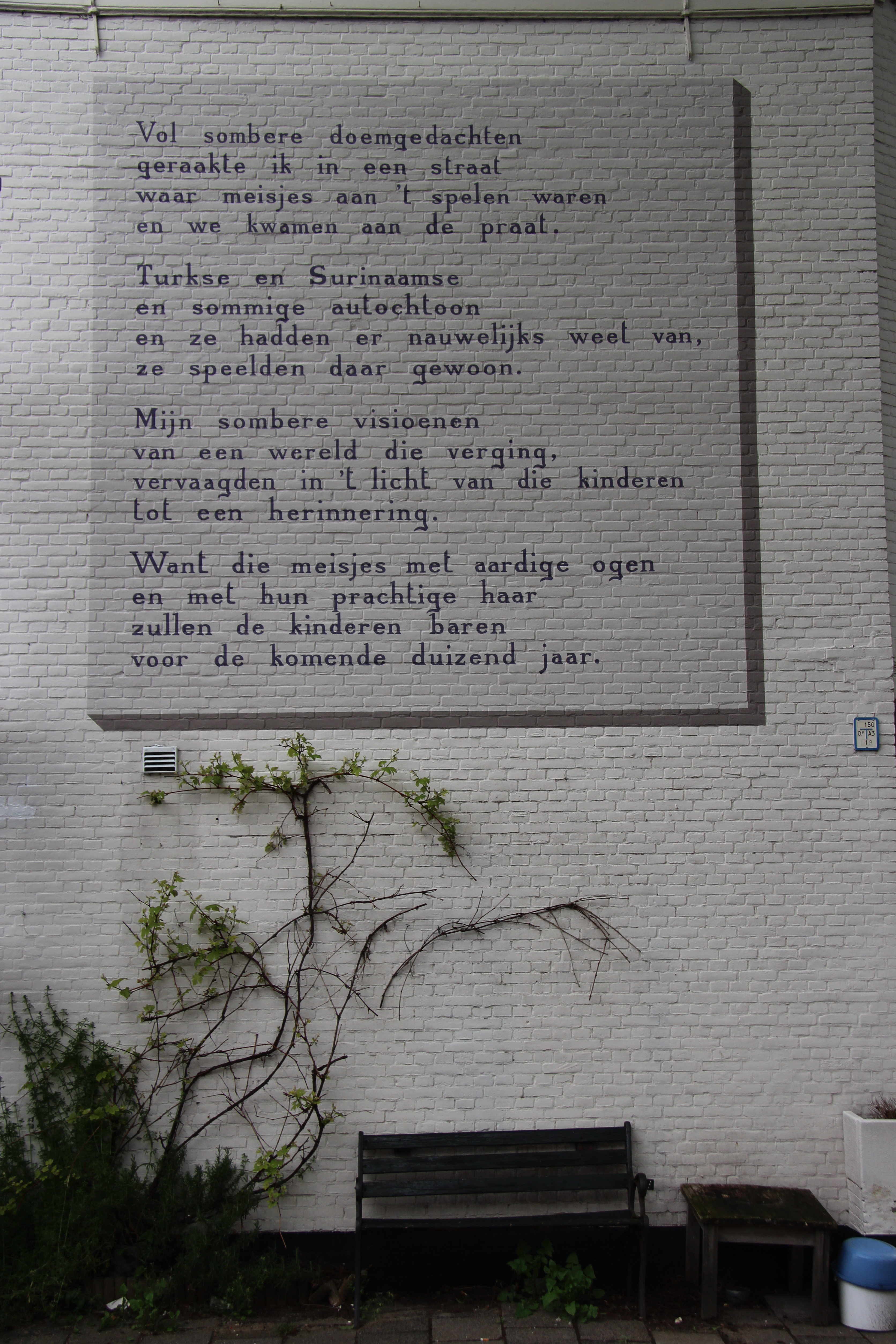 Muurgedicht Willem Wilmink - Spelende meisjes. Nog zonder signatuur. Muurgedicht op de hoek van Maredijk en Poelgeeststraat in Leiden. Officiële onthulling tijdens het vierde eeuwfeest van de Maredijkbuurt van 8 t/m 15 juni 2013.